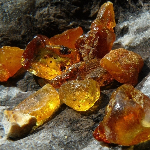 Baltischer Bernstein (Ostseeküste Schonen/Südschweden)